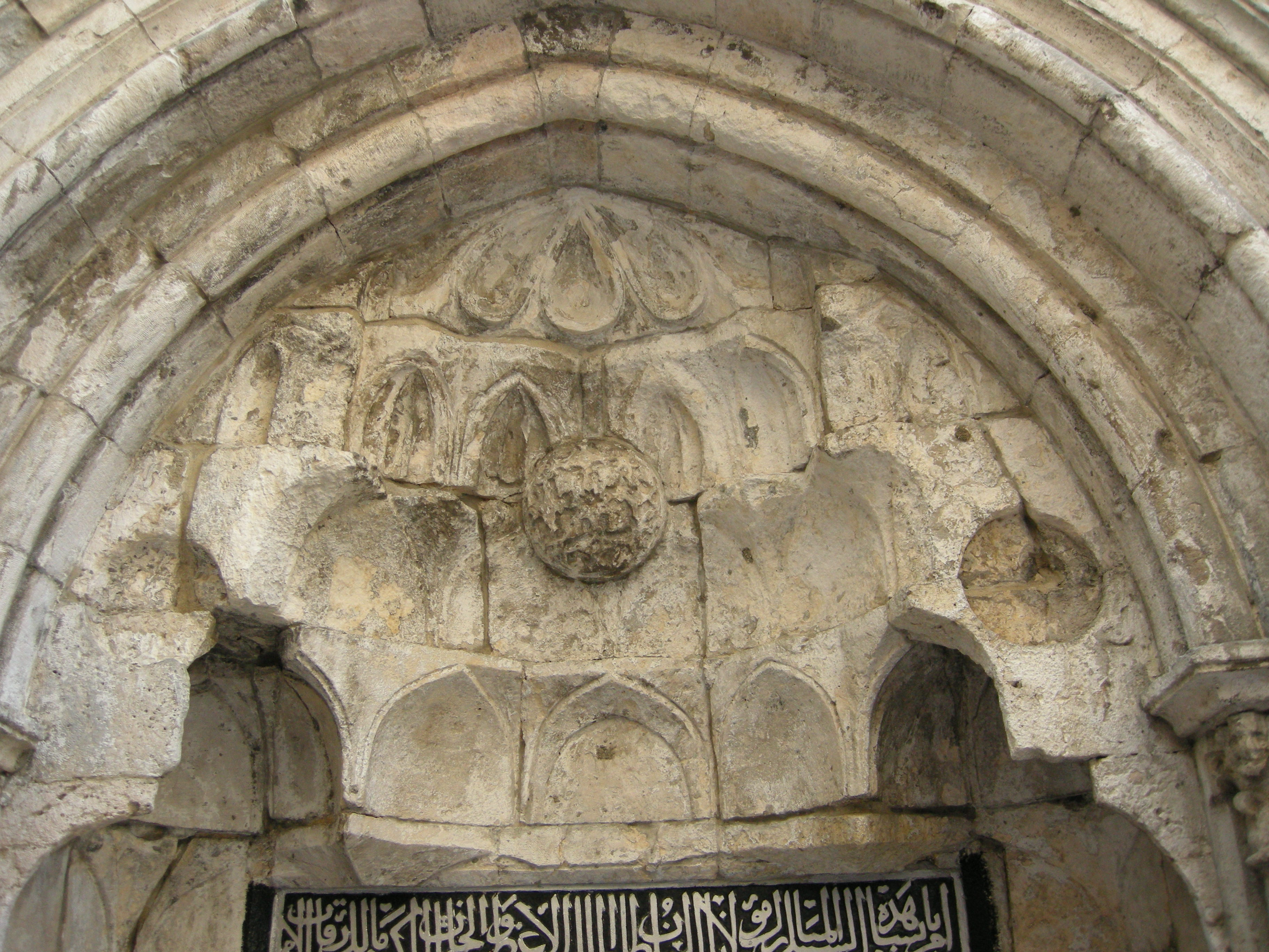 Mamluk impact on Jerusalem